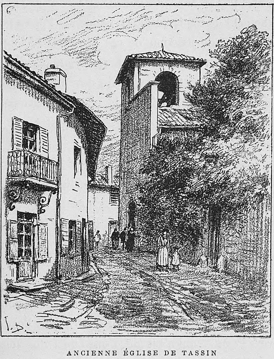 Aux environs de Lyon / Monsieur Josse ; préface de M. Coste-Labaume ; édition illustrée de 250 dessins de J. Drevet.